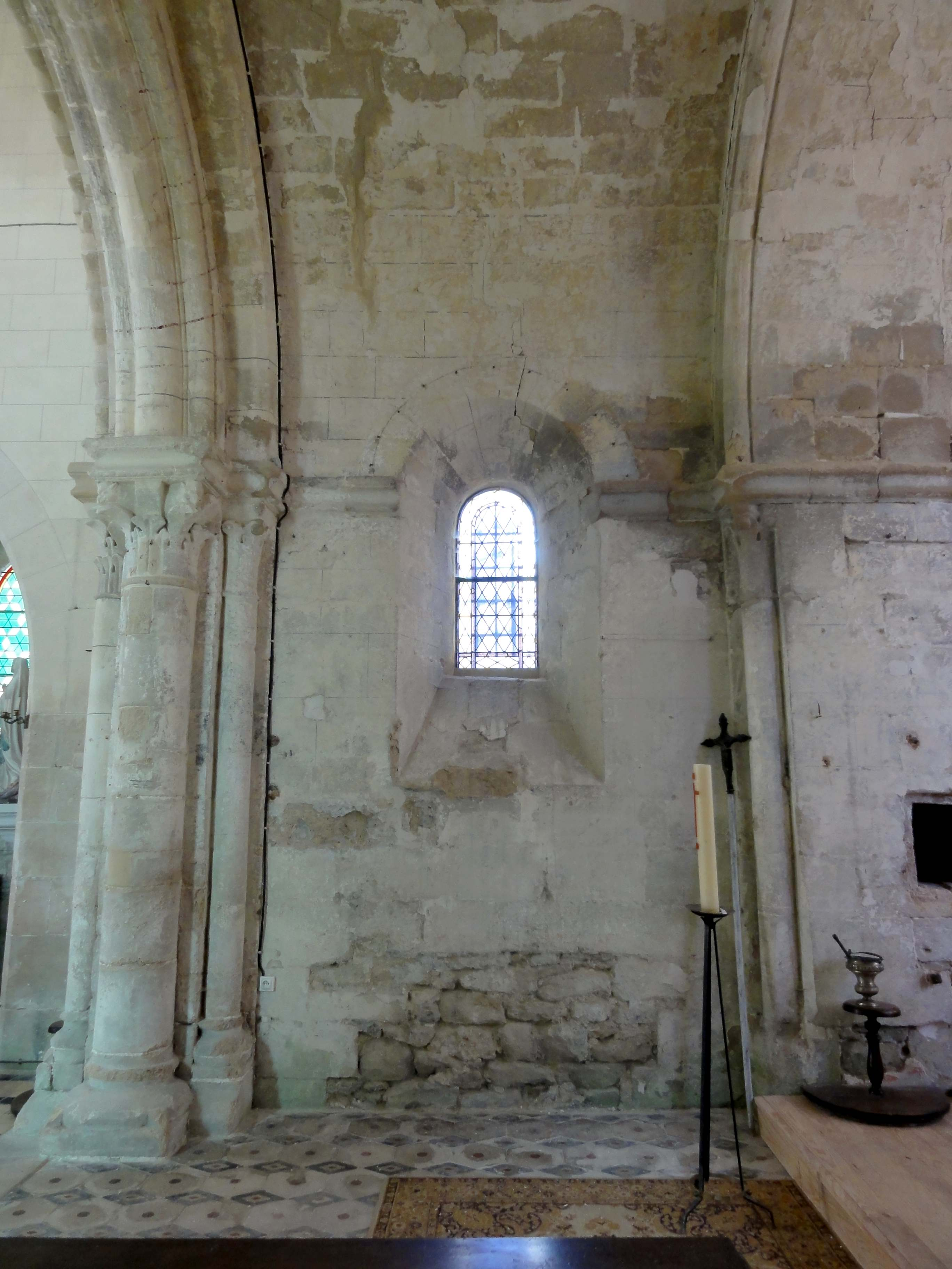 Intérieur de l'église (voir titre).